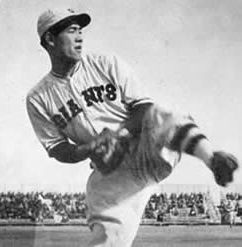 沢村栄治